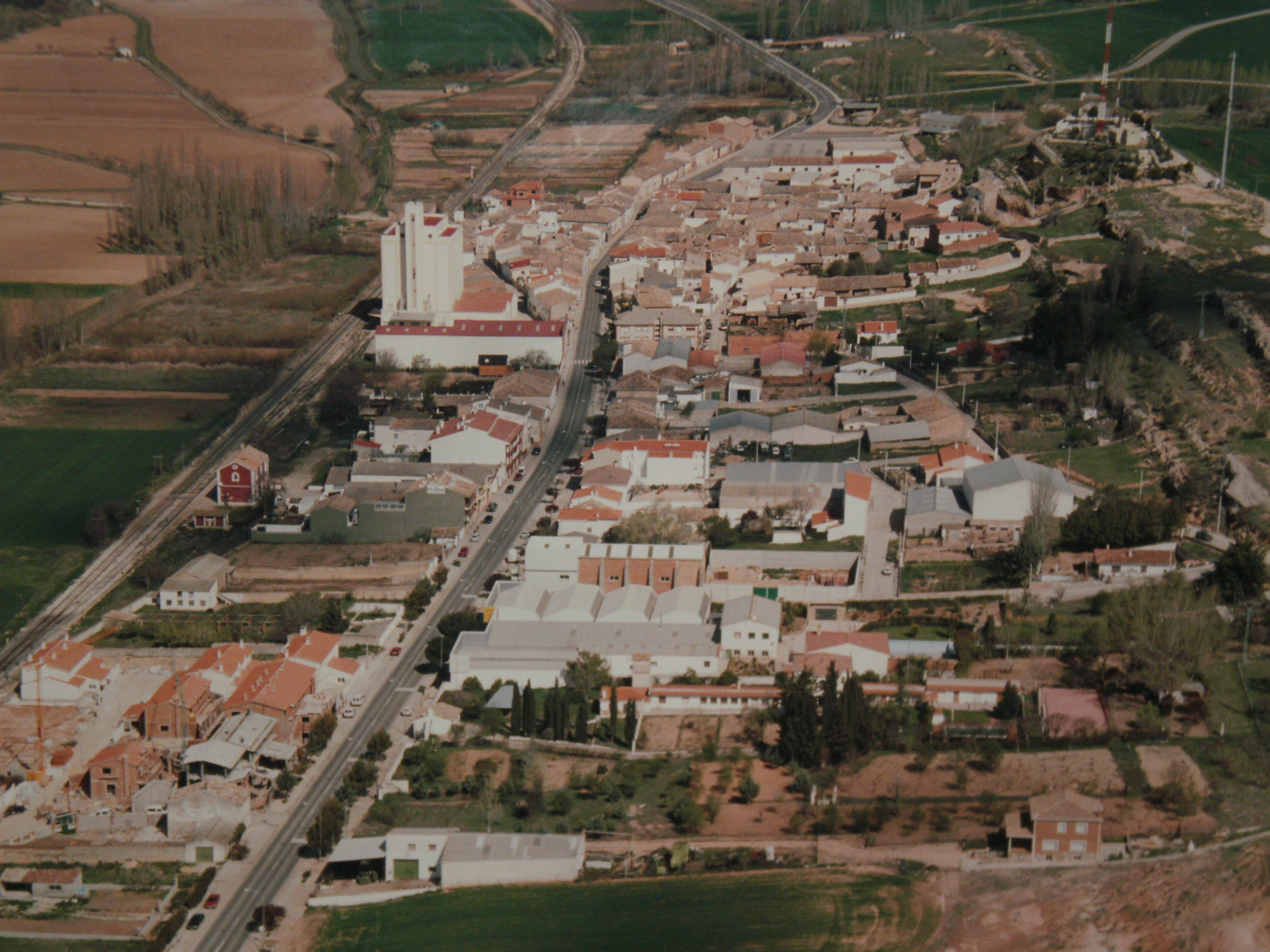 Chillaron de Cuenca herria, Gaztela La Mantxa.